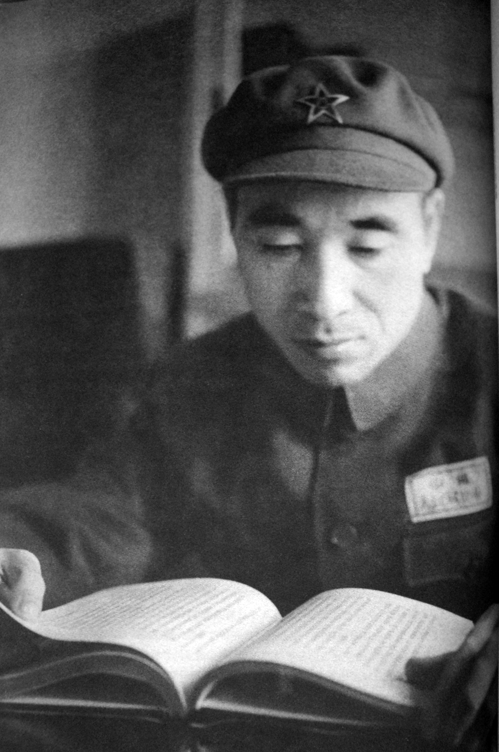 林彪在看书